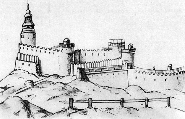 Szkic Chojnik z 1908 przedstwaiajacy zamek w 1675